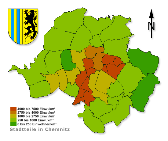 Einwohnerdichte der einzelnen Chemnitzer Stadtteile (Stand: 30. Juni/31. Dezember 2001)